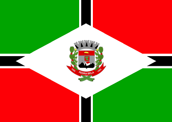 Bandeira da cidade de Pedra Bela, SP.